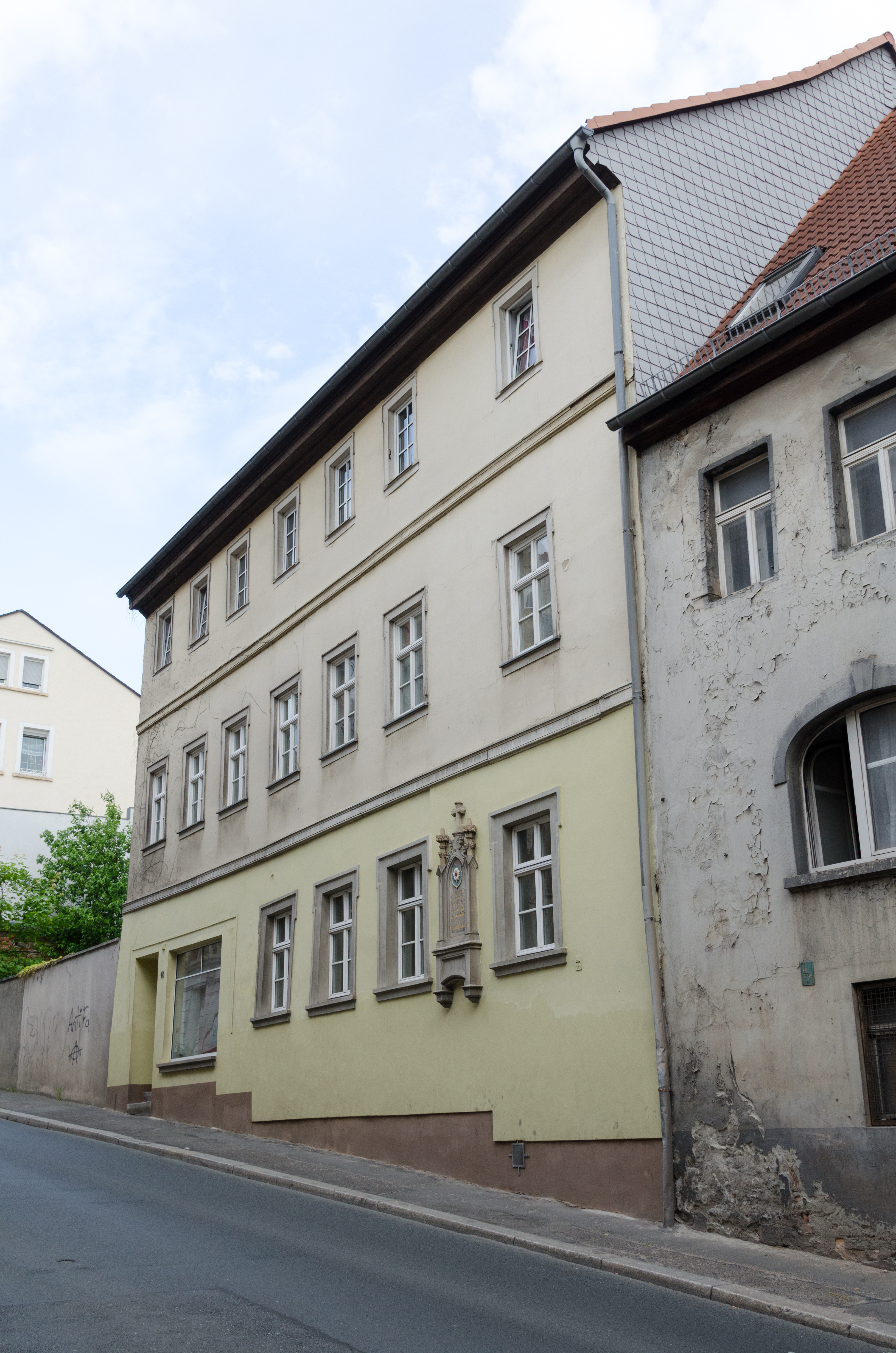 Zeitz, Rahnestraße 18